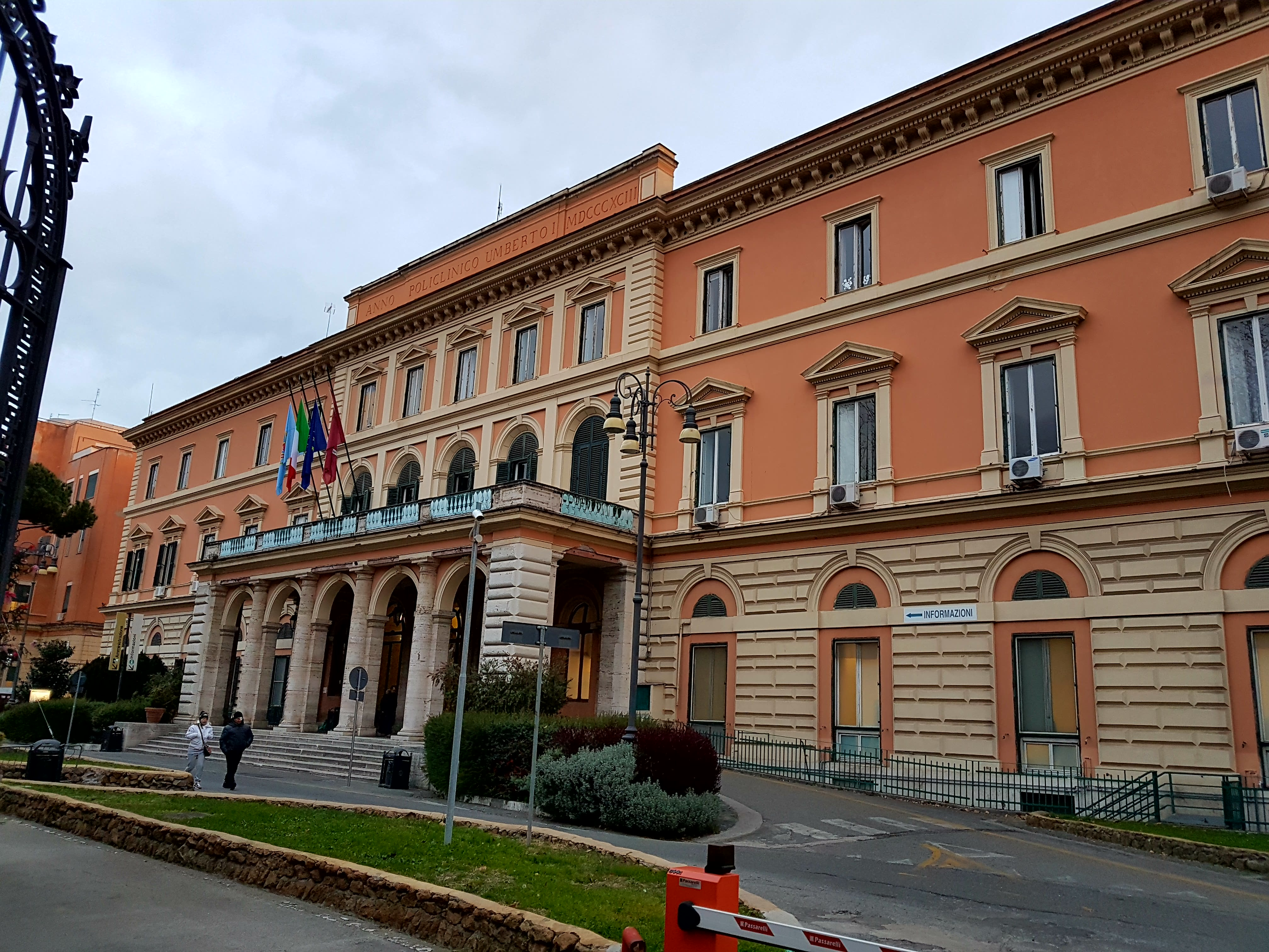 Ingresso principale del Policlinico Umberto I a Roma